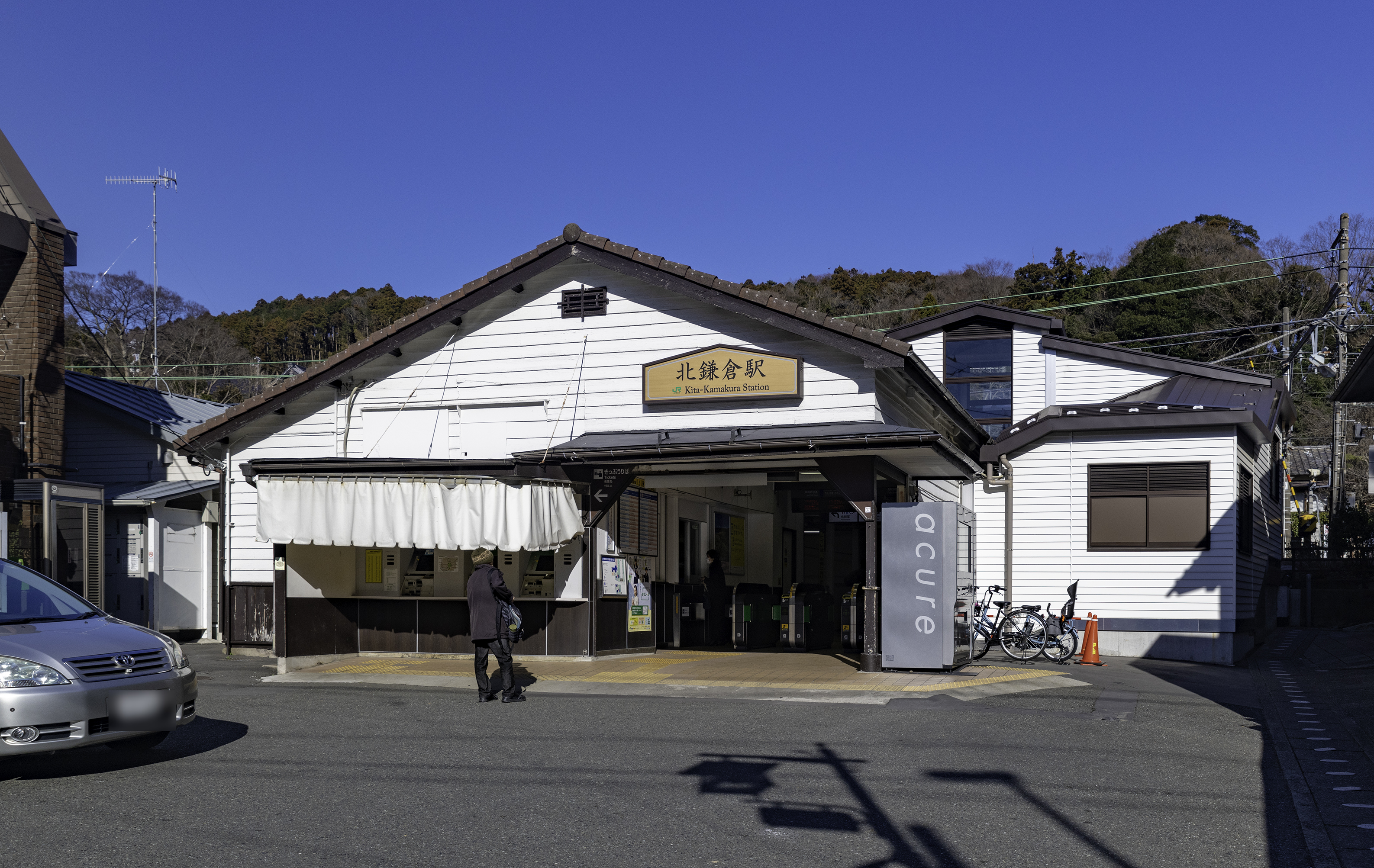 東日本旅客鉄道株式会社横須賀線北鎌倉駅駅舎